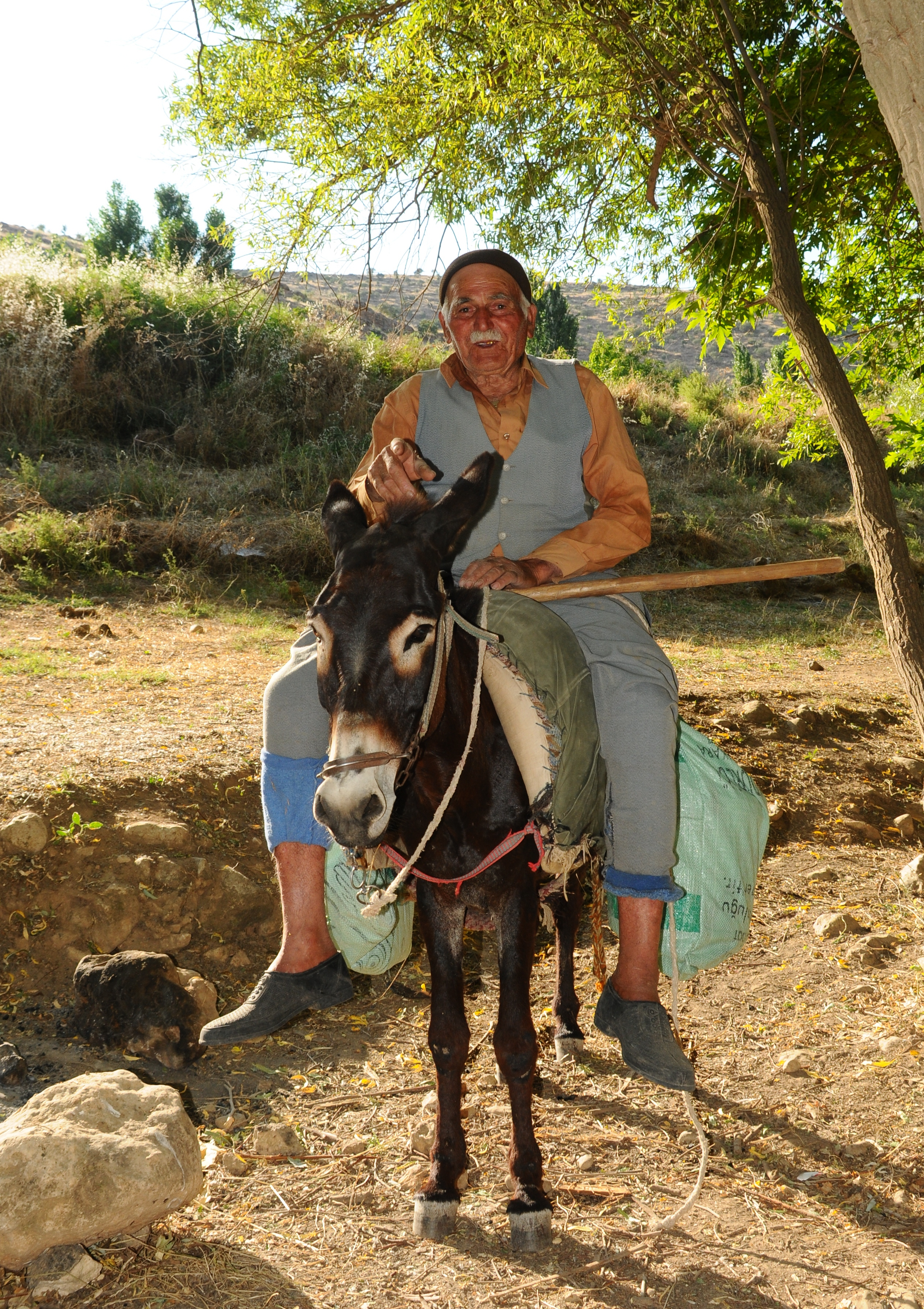 Kurdî: A man from Cilîn